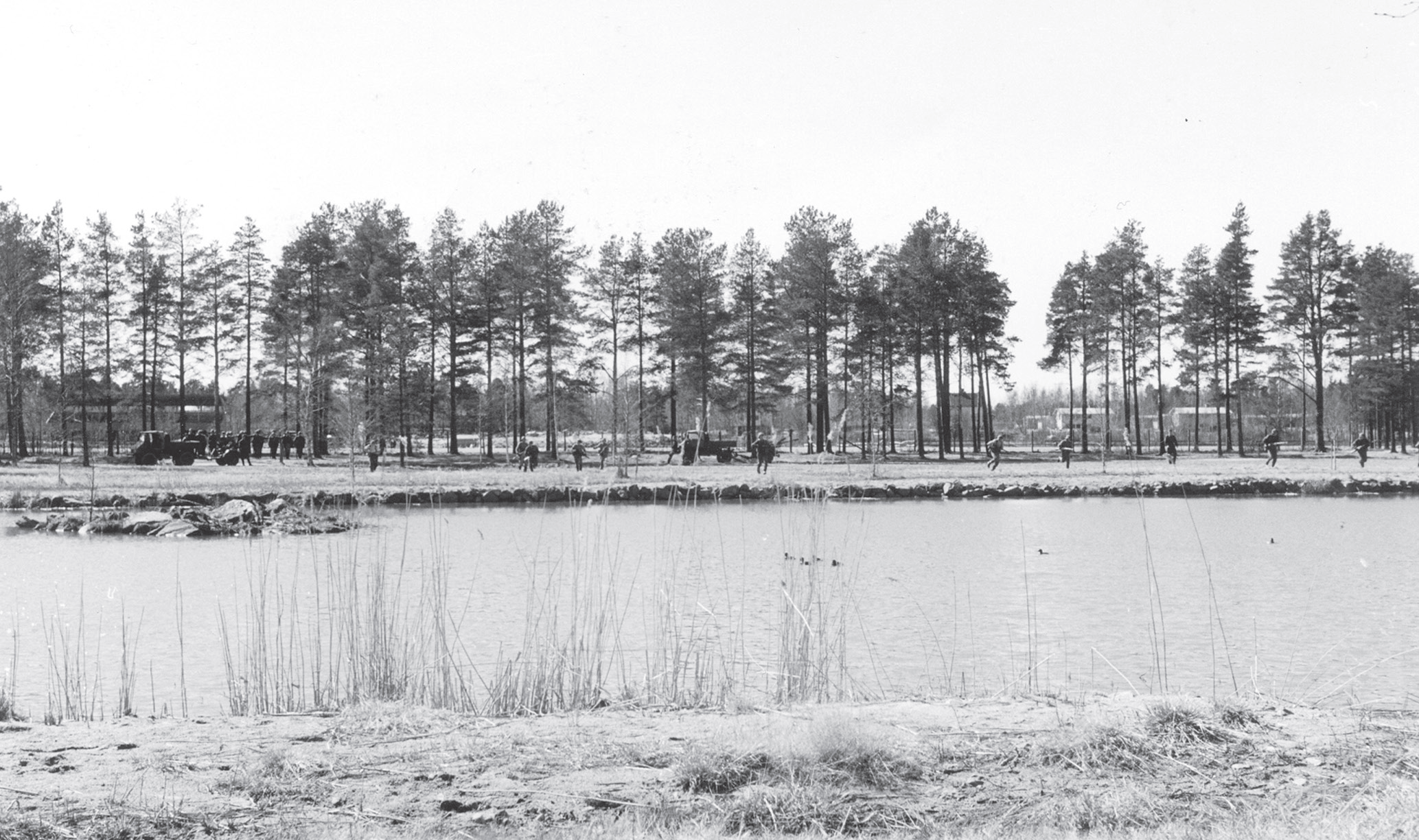 Taistelukoulutusta Pikiruukin Ankkalammen ympäristössä.